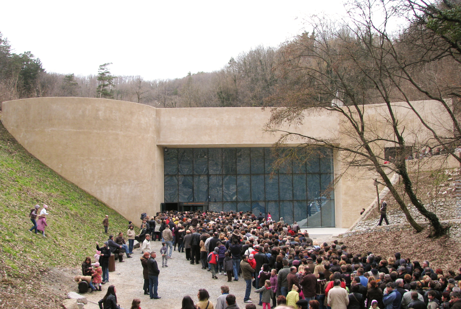 Muzej krapinskih neandertalaca u Krapini. Otvaranje za građanstvo 28.2.2010.